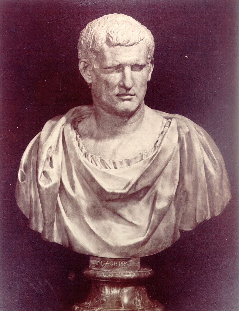 Marcus Vipsaniuns Agrippa